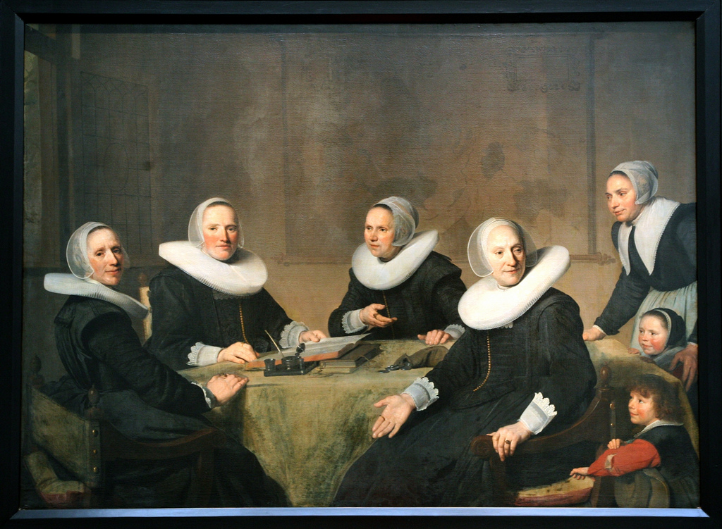 De regentessen van het Haarlemse stads-armenhuis Heilige Geesthuis, later Burgerweeshuis en nog later Coen Cuser Huis te Haarlem; hier ten tijde van de naam Heilige Geesthuis toen het gevestigd was aan de Krocht (huidige locatie van het Hofje van Oorschot). Dit schilderij hing in de regentenkamer aan de Krocht en later in het Magdalena huis aan de Kinderhuisvest, waarna het kwam bij het Frans Hals Museum.